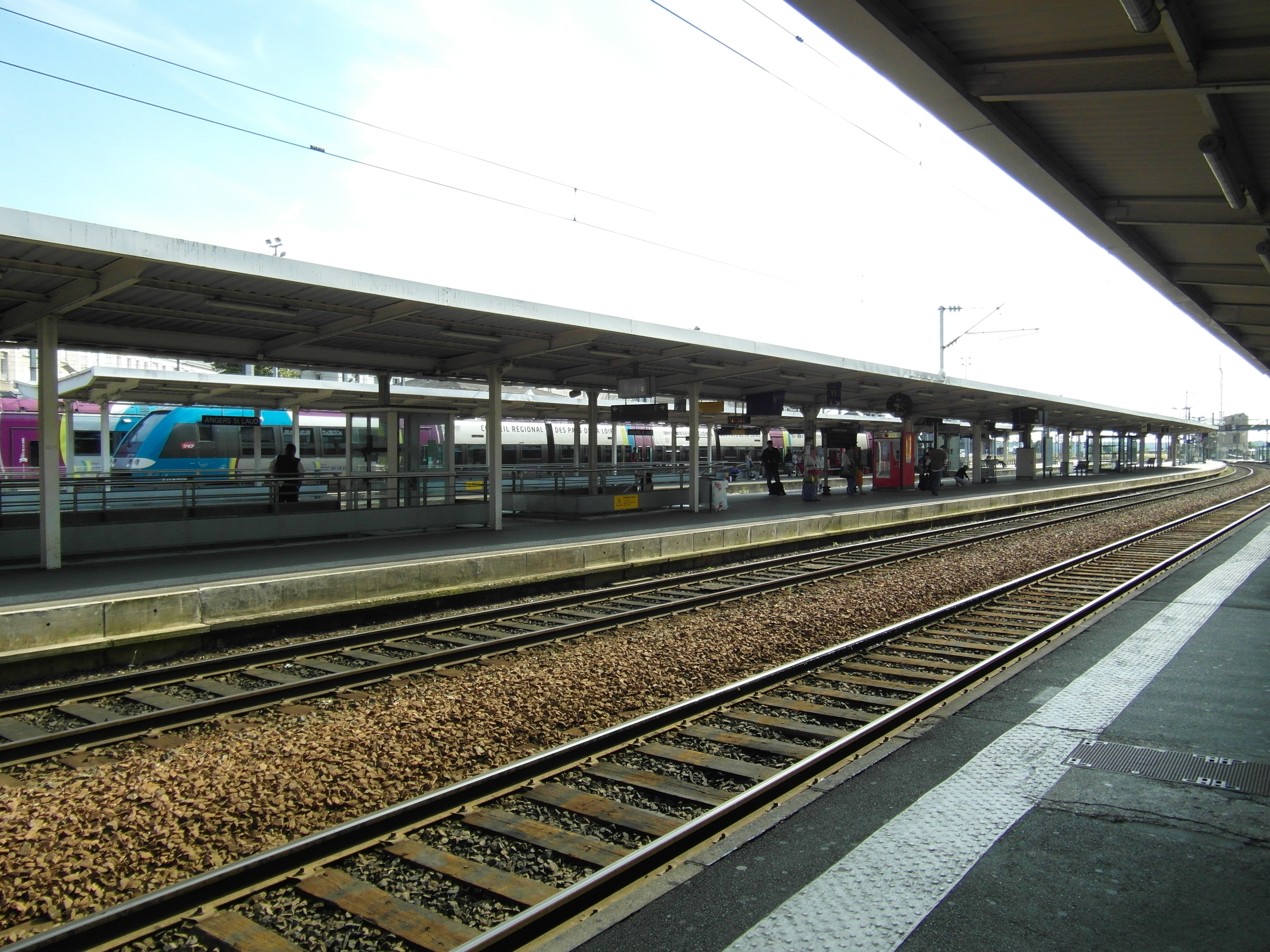 Angers - Gare Saint-Laud